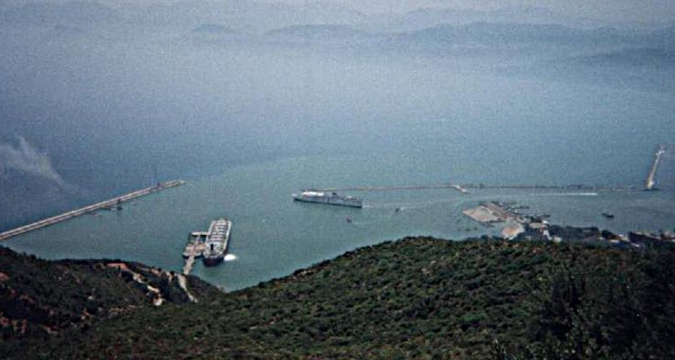 Vue générale du port